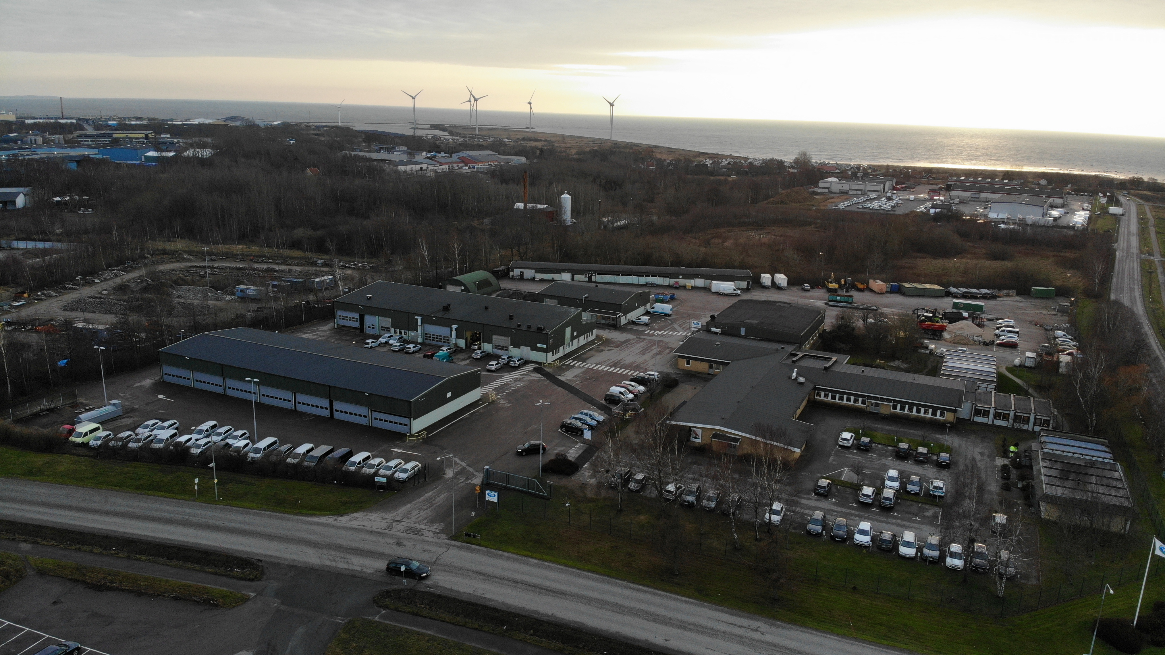 Huvudkontoret i Falkenberg, foto taget 20 december 2019 med drönare.